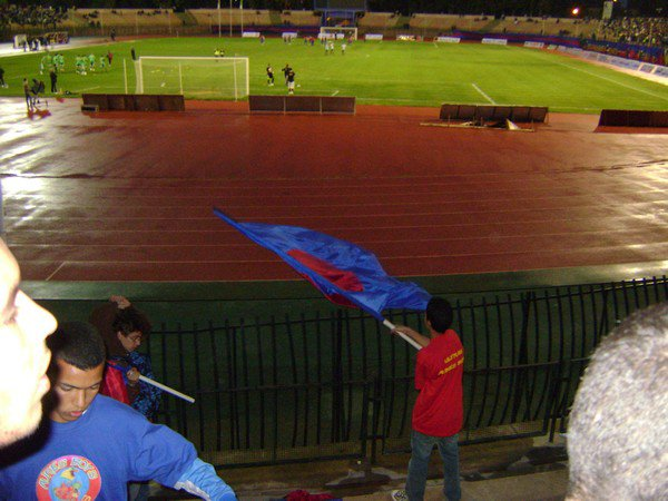 Stade du 1er Novembre 1954 Batna.Photo prise lors du match CA Batna-USM Alger le 6 Aout 2009, tribune Sud.